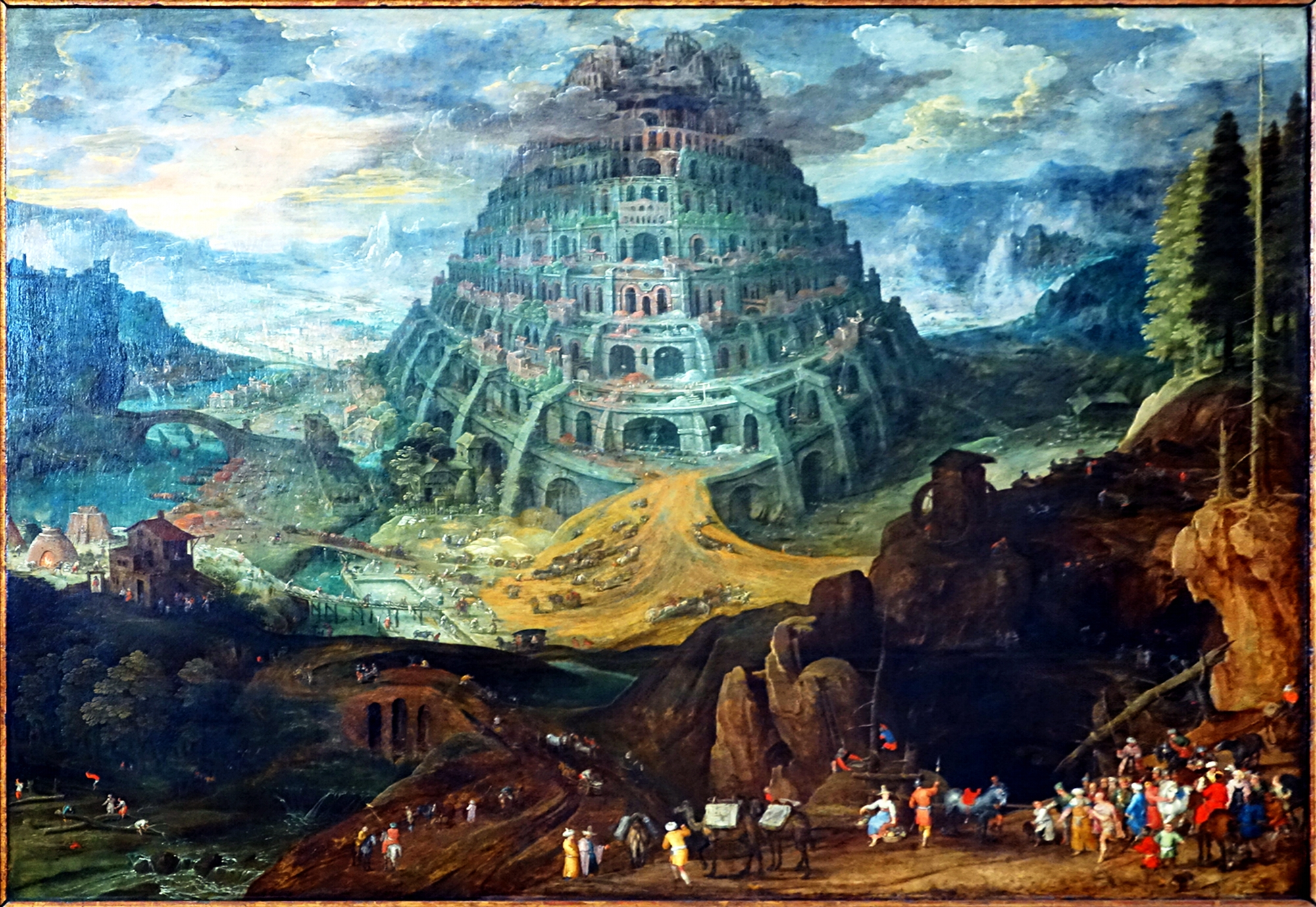 Paysage avec la tour de Babel au Palais des beaux-arts de Lille.